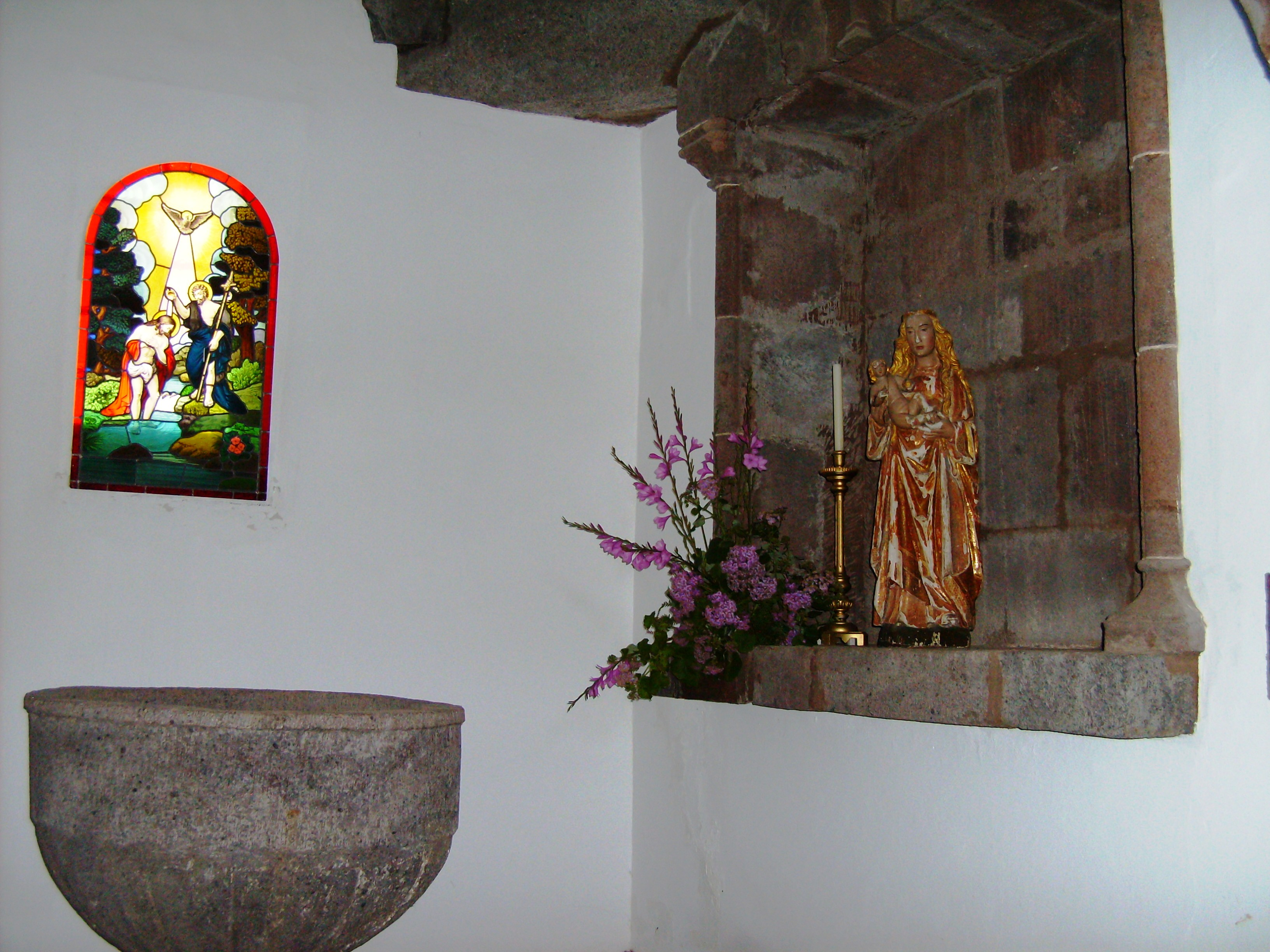 Igreja Matriz de Nossa Senhora da Assunção, Ilha de Santa Maria (Açores), Portugal.